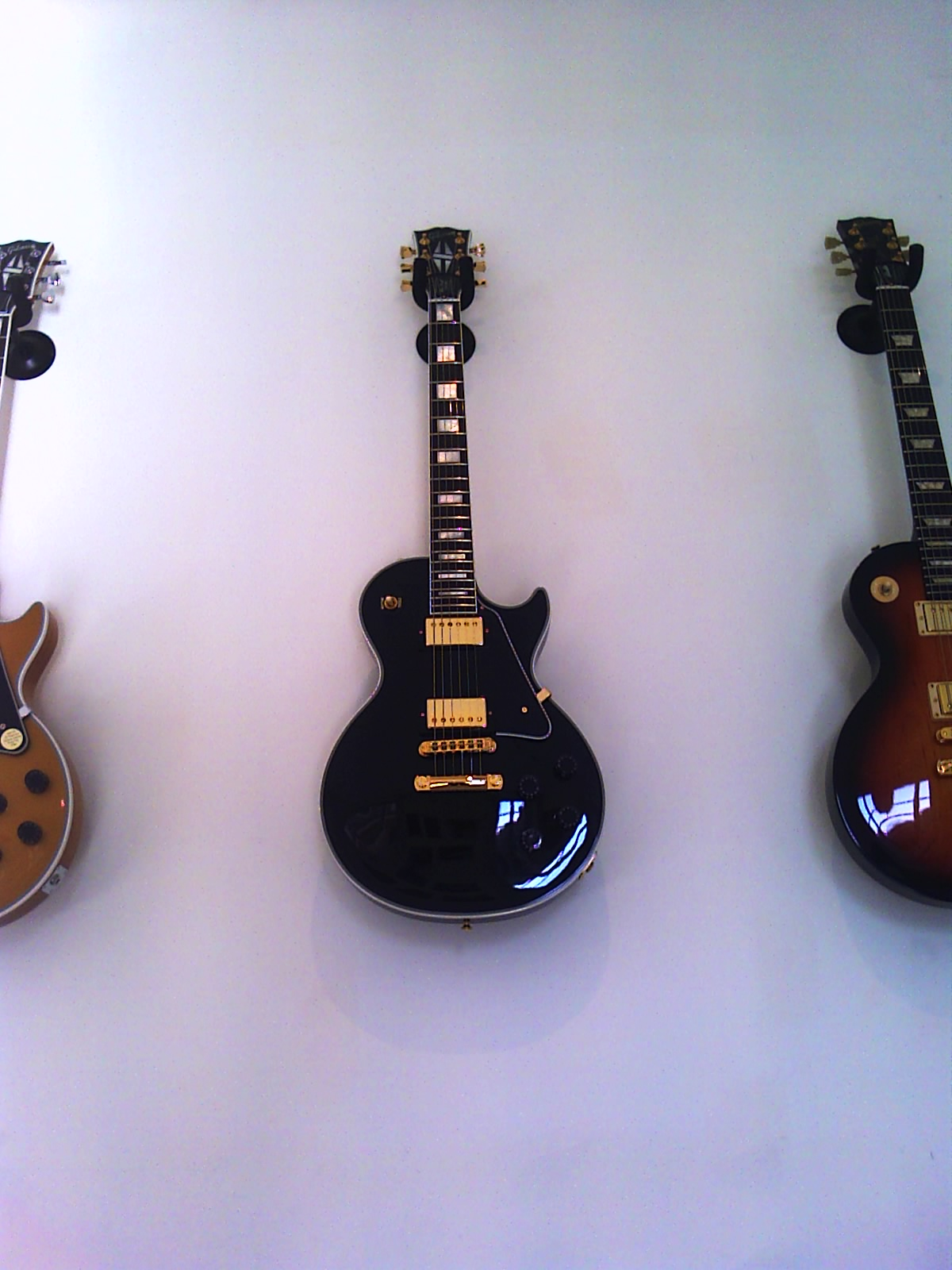 Gibson Les Paul Custom